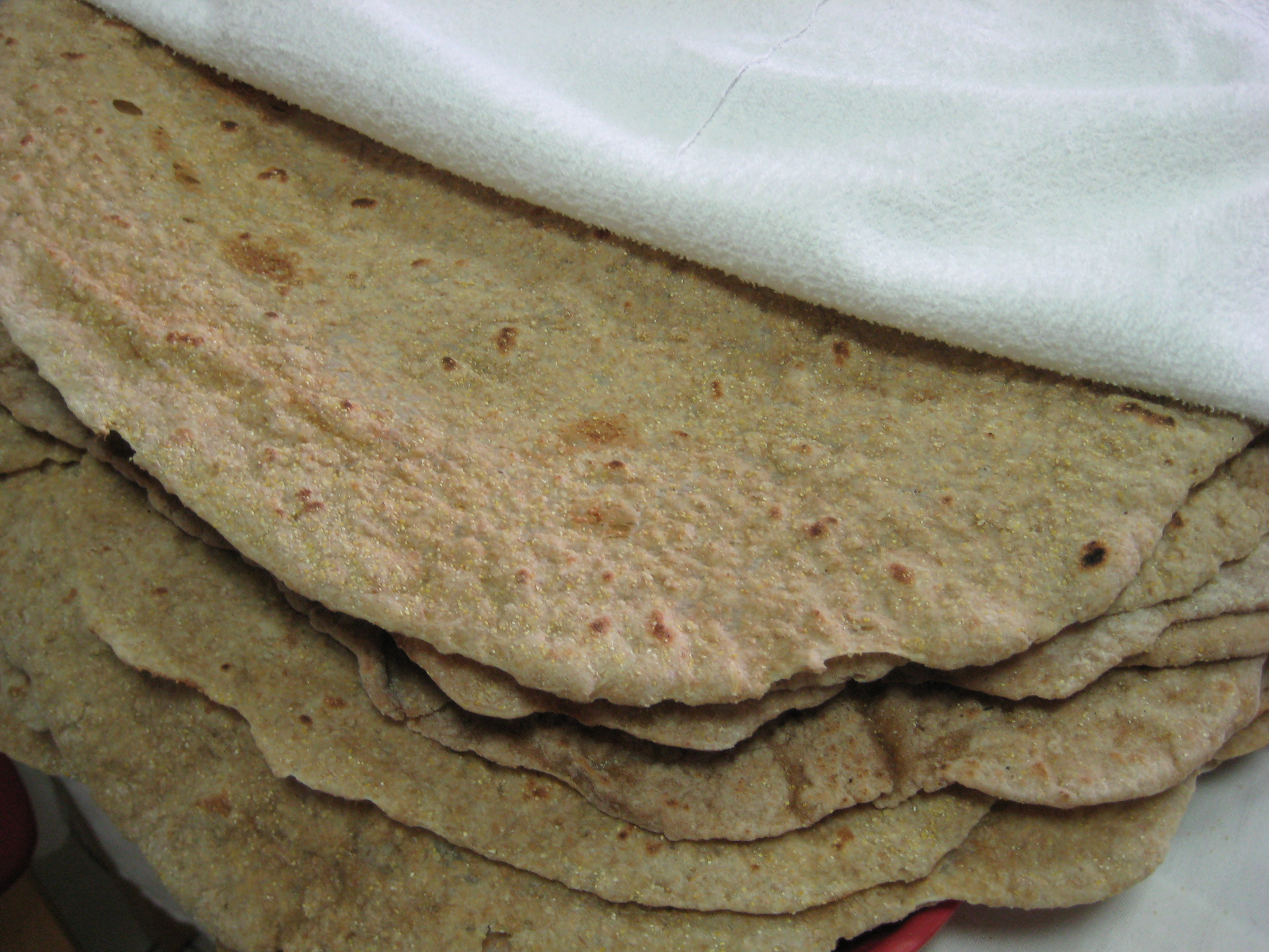 Saj - Arabic flat bread